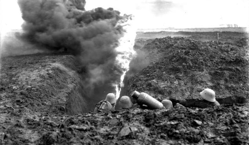 I. Weltkrieg 1914-1918 Übungsdivision Flammenwerfer in Tätigkeit